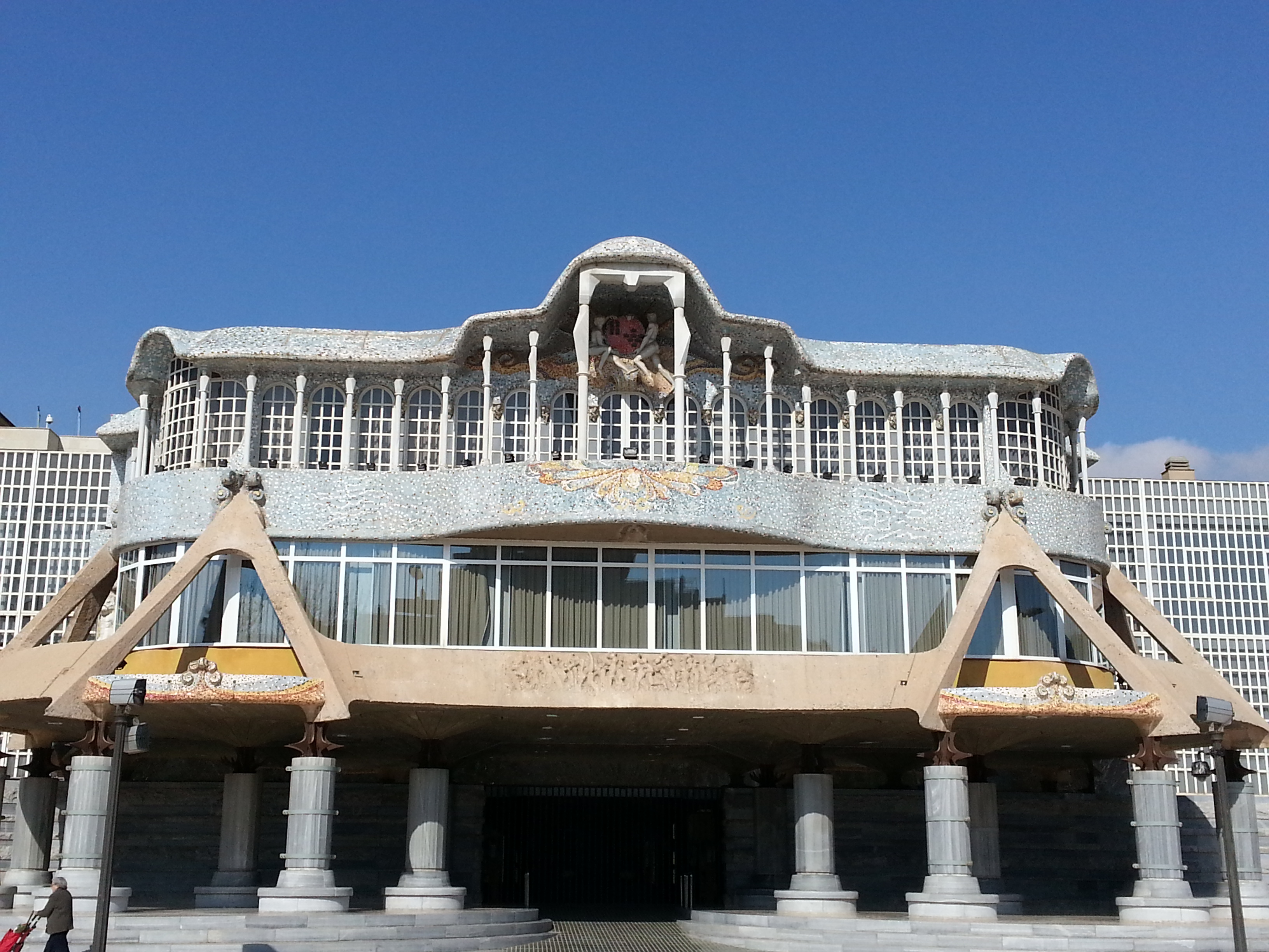 Parlamento autonómico de la Región de Murcia, situado en Cartagena.